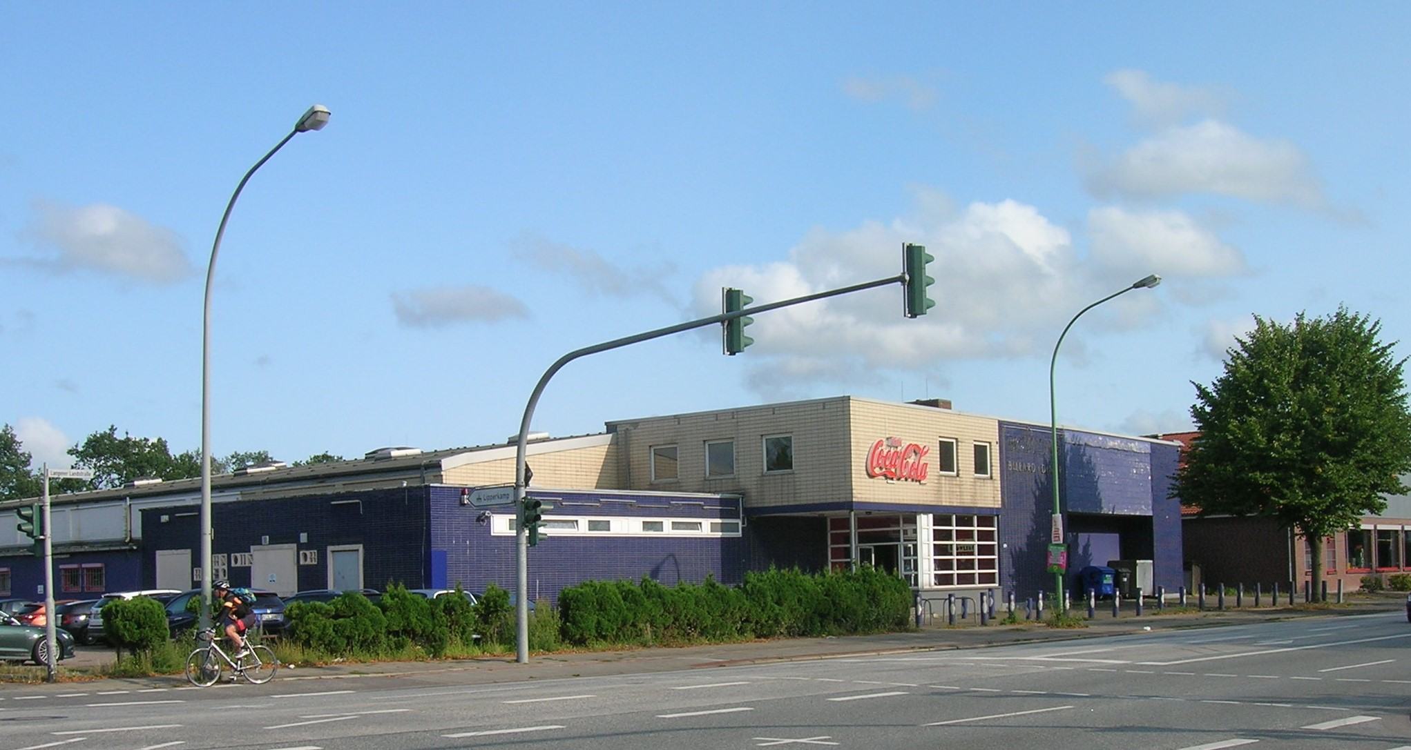 Bowlingcenter in Bremerhaven-Lehe